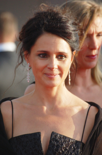 Anouk Grinberg au festival du film américain de Deauville.